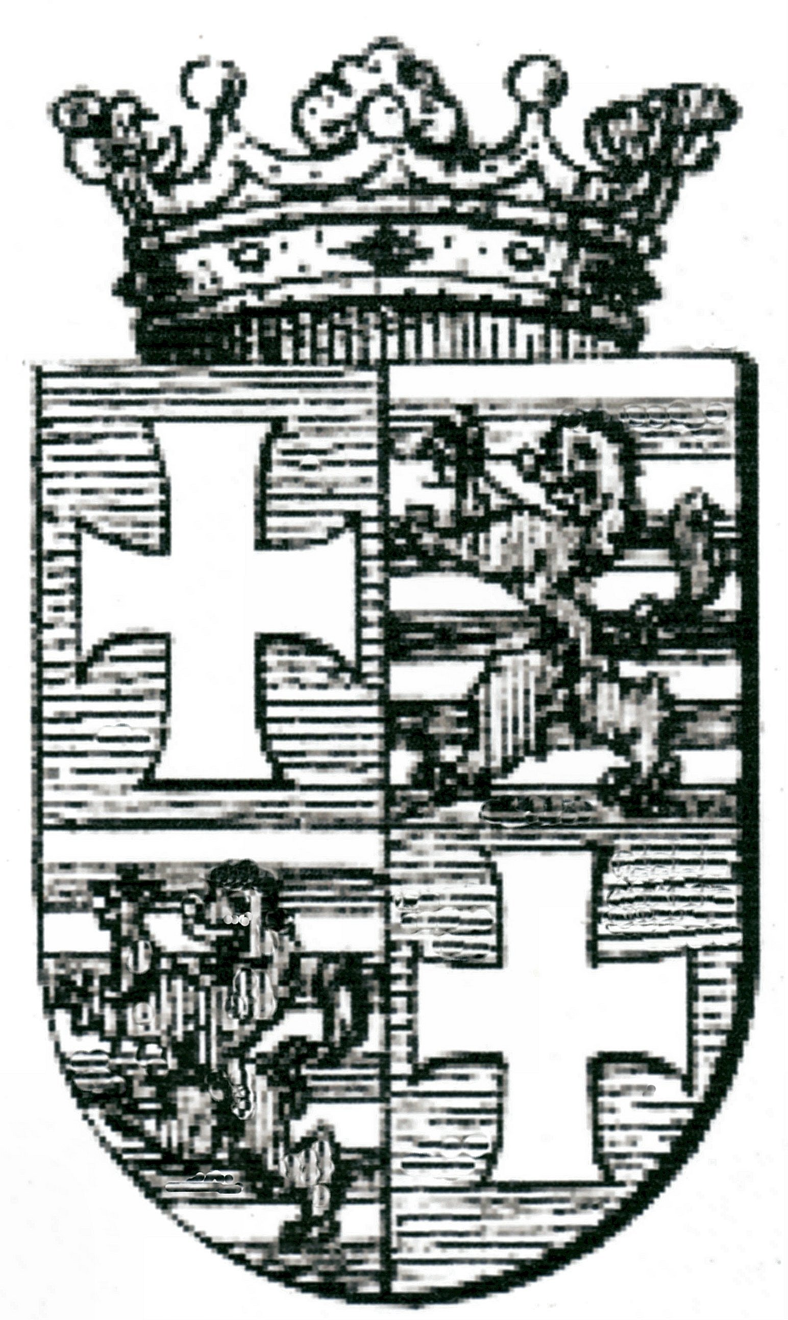 Wappen der Marquis de Lusignan (1888 Aufnahme in Buch)